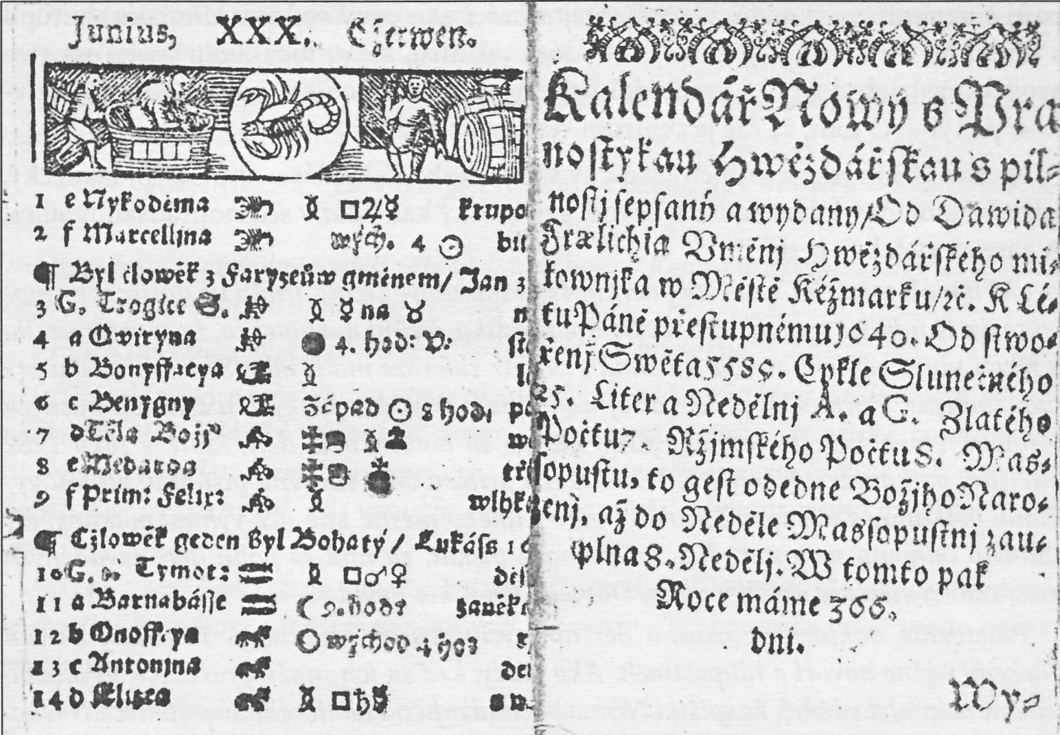 Slovenský kalendár, ktorý zostavil v roku 1640 David Frölich . Bol geograf, historik, astronóm, fyzik, chemik, filológ, pedagóg, cestovateľ... - jeden z najväčších vedcov Európy z obdobie sedemnásteho storočia. Narodil sa v Ľubici, okres Kežmarok. Žil v Kežmarku - Slovakia.